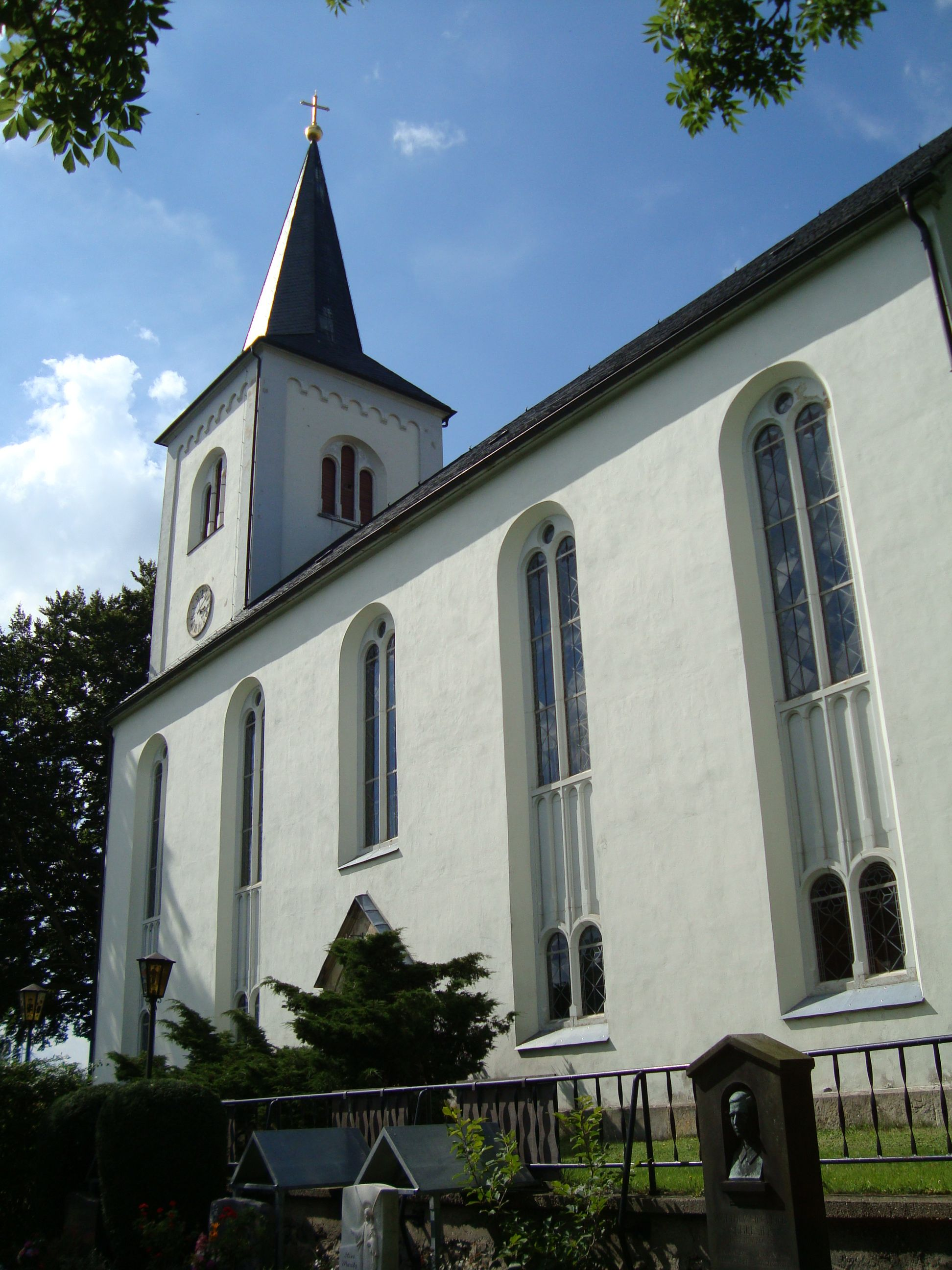 Evangelische Kirche in Dorfchemnitz OT Voigtsdorf im Erzgebirge